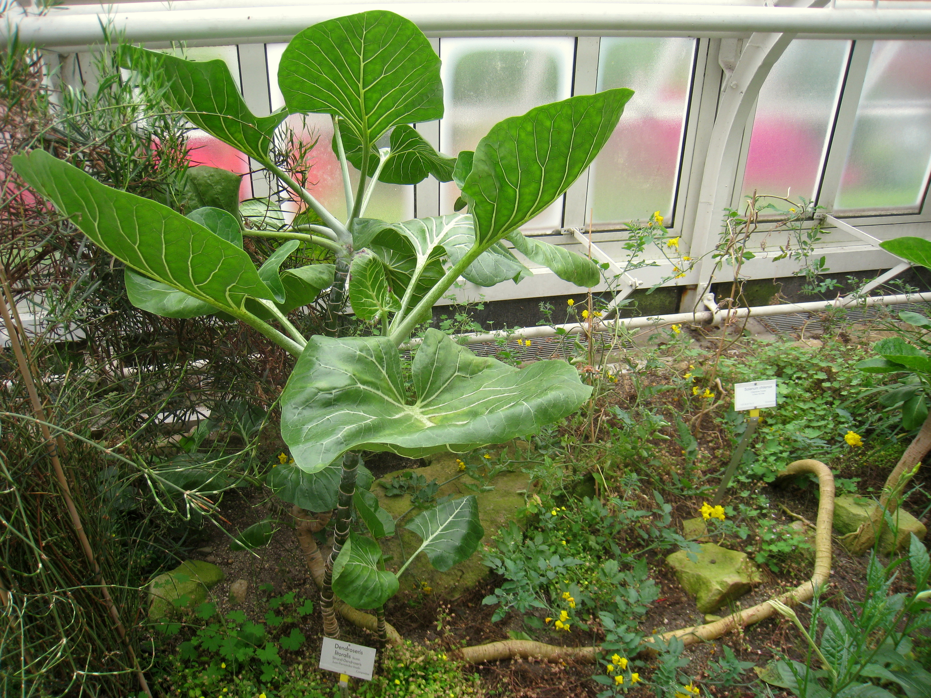 Dendroseris litoralis specimen in the Botanischer Garten, Berlin-Dahlem (Berlin Botanical Garden), Berlin, Germany.